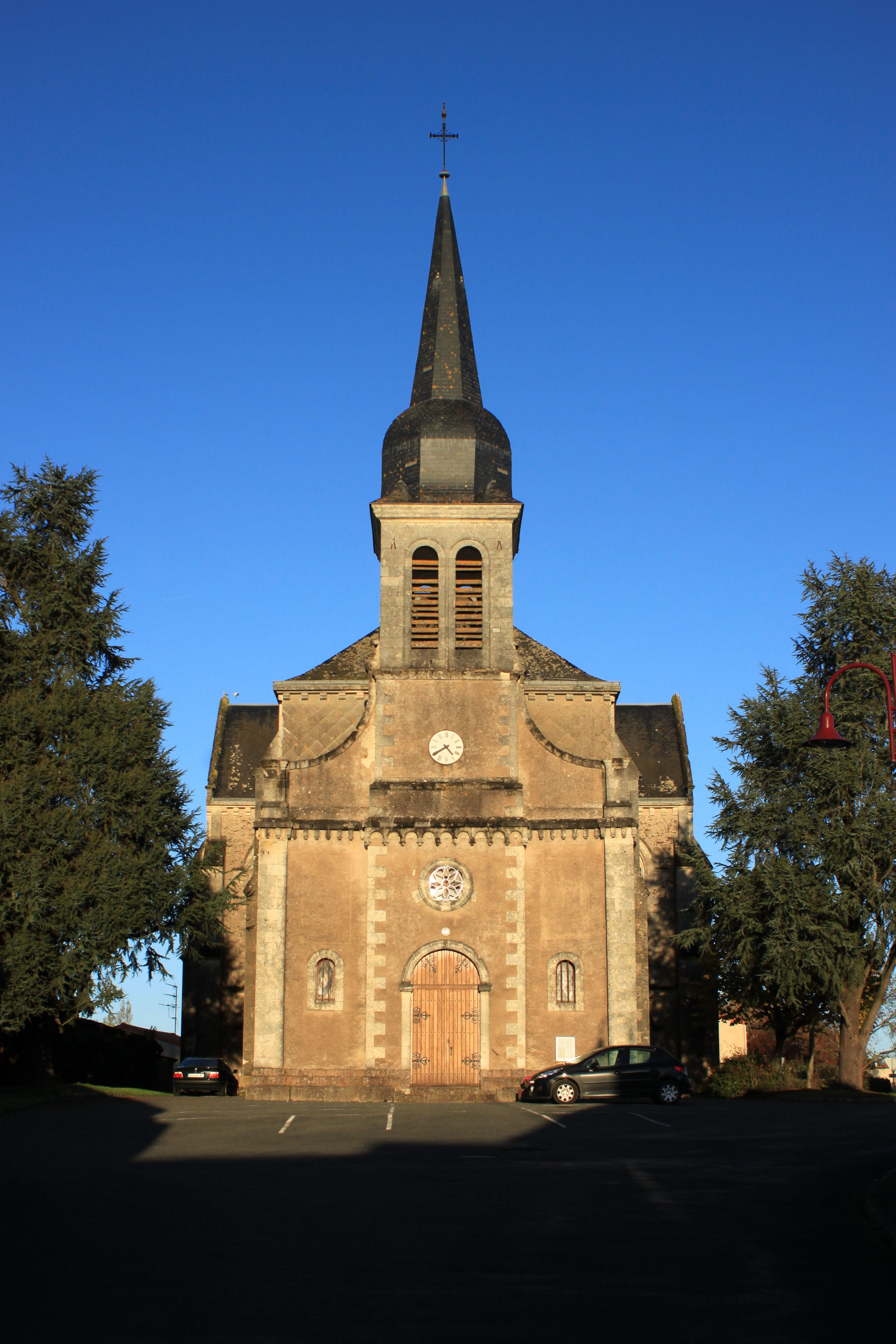 Église Saint-Hilaire, XIX°, Fr-49-La Salle-et-Chapelle-Aubry.